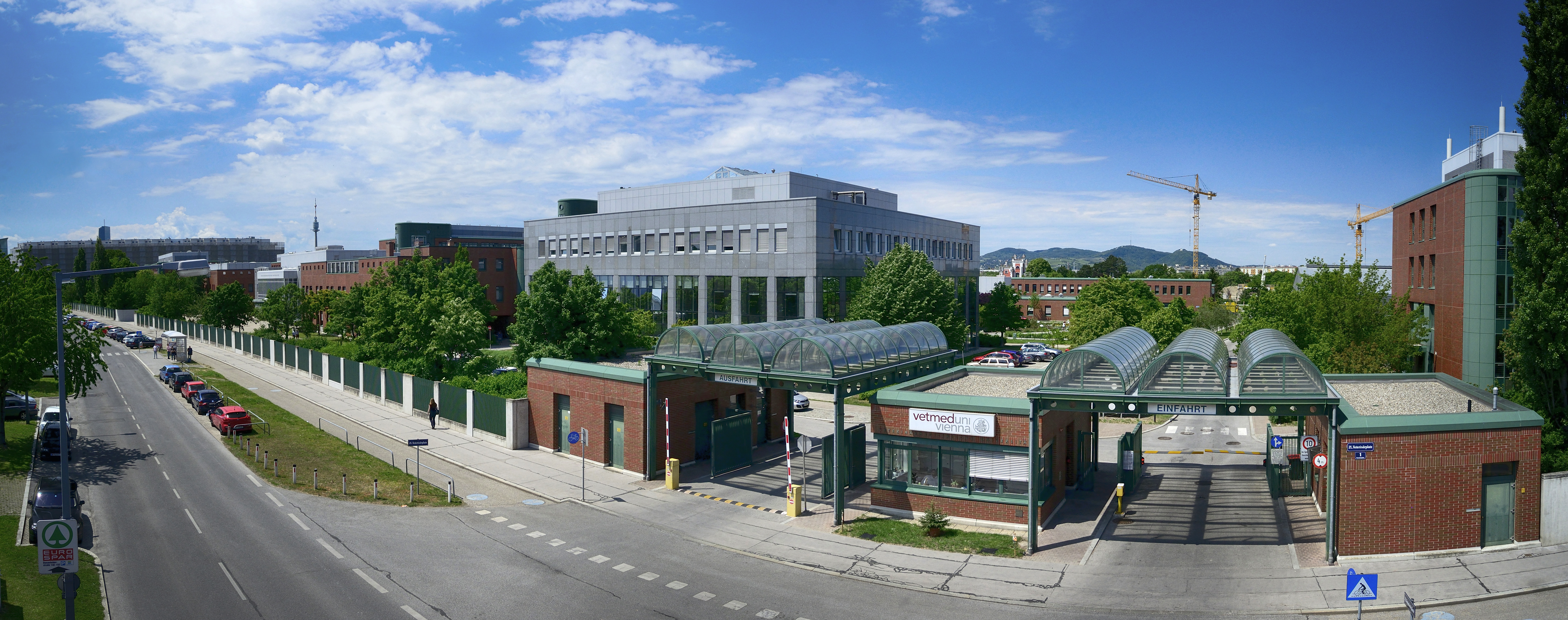 Vetmeduni Vienna, Foto: Johannes Zinner